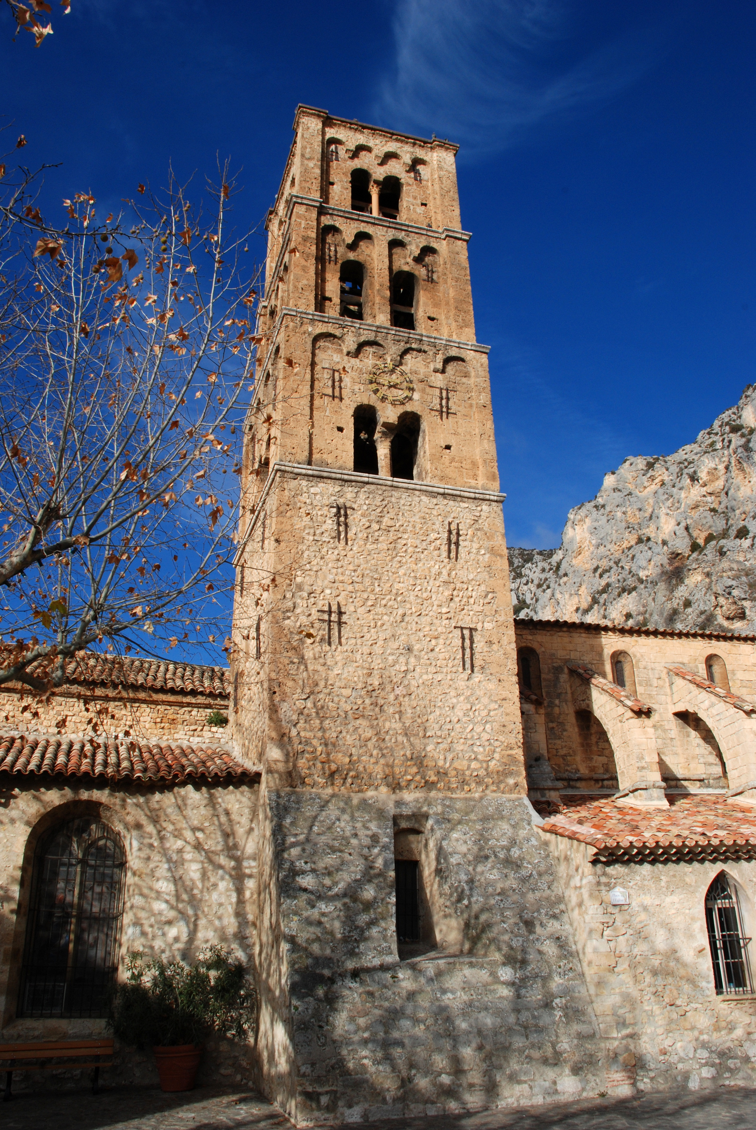 Moustiers-Sainte-Marie - Clocher roman lombard